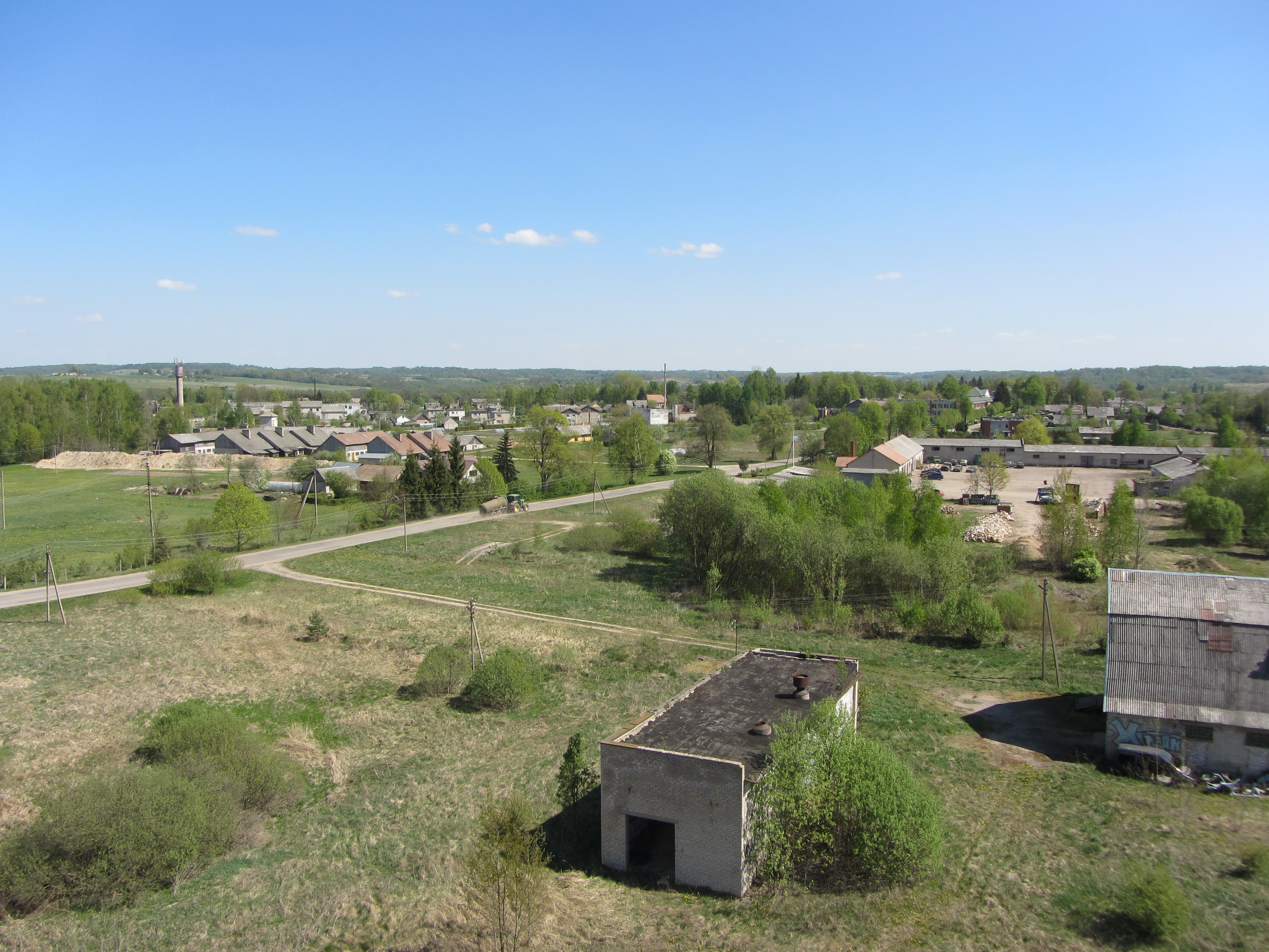 Giedraičiai, Lithuania